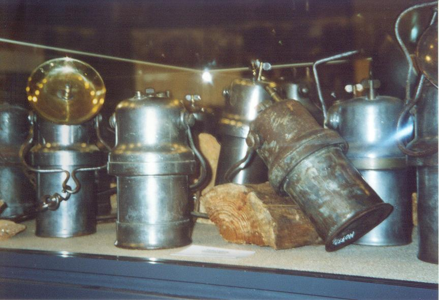 Karbidsluuchten, fabrizéiert zu Téiteng